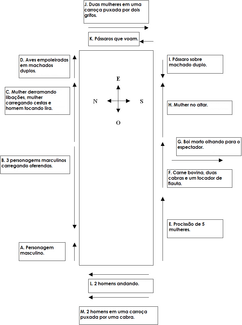 Descrição das treze cenas do sarcófago de Agia Triada